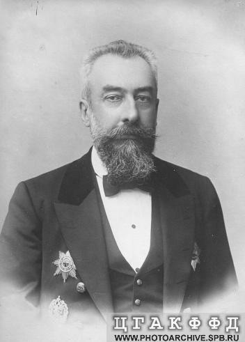 Pyotr Kaufman, Russian minister of education (1906-1907) Министр народного просвещения Петр Михайлович Кауфман.